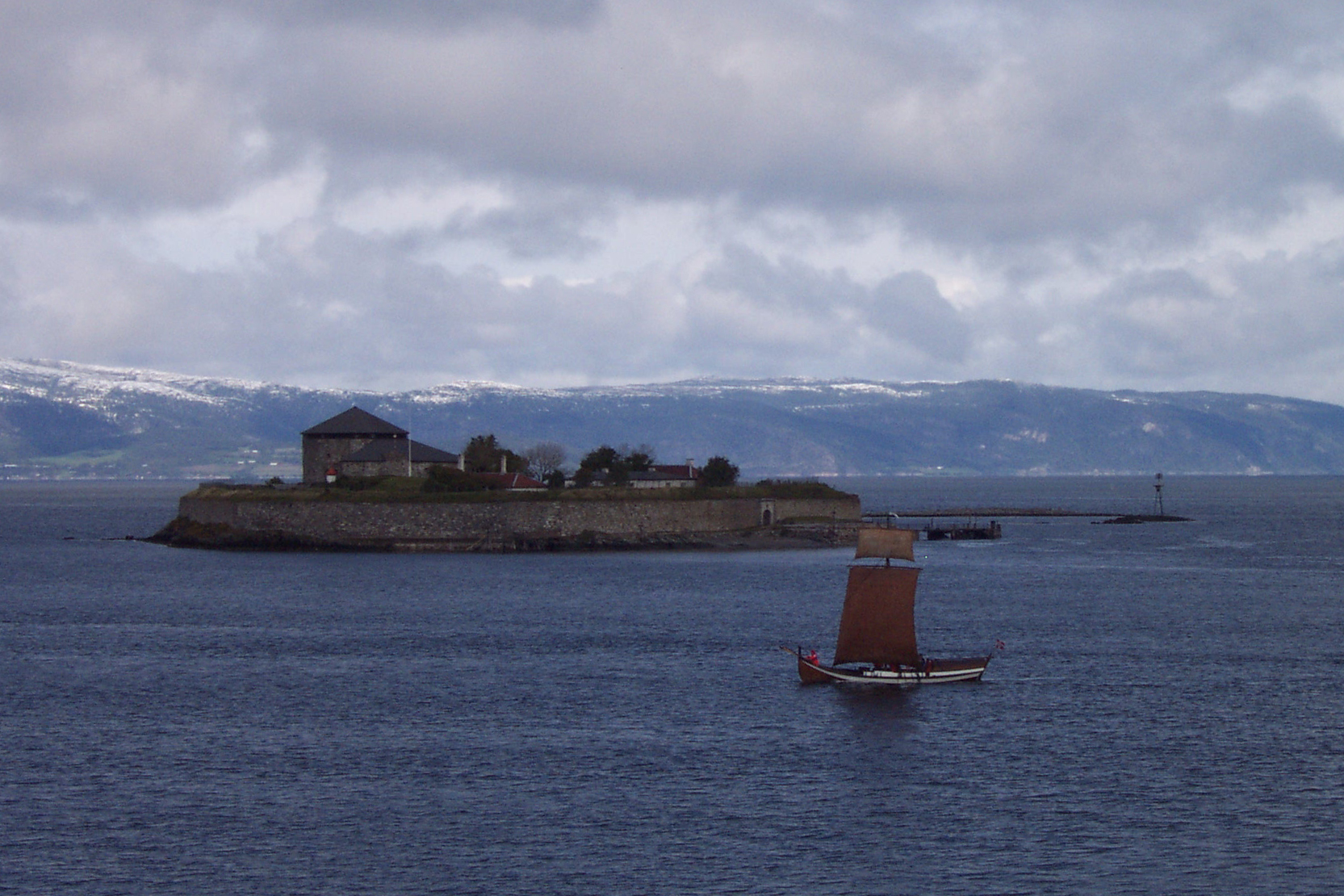 Un drakkar sous voiles à Trondheim en Norvège